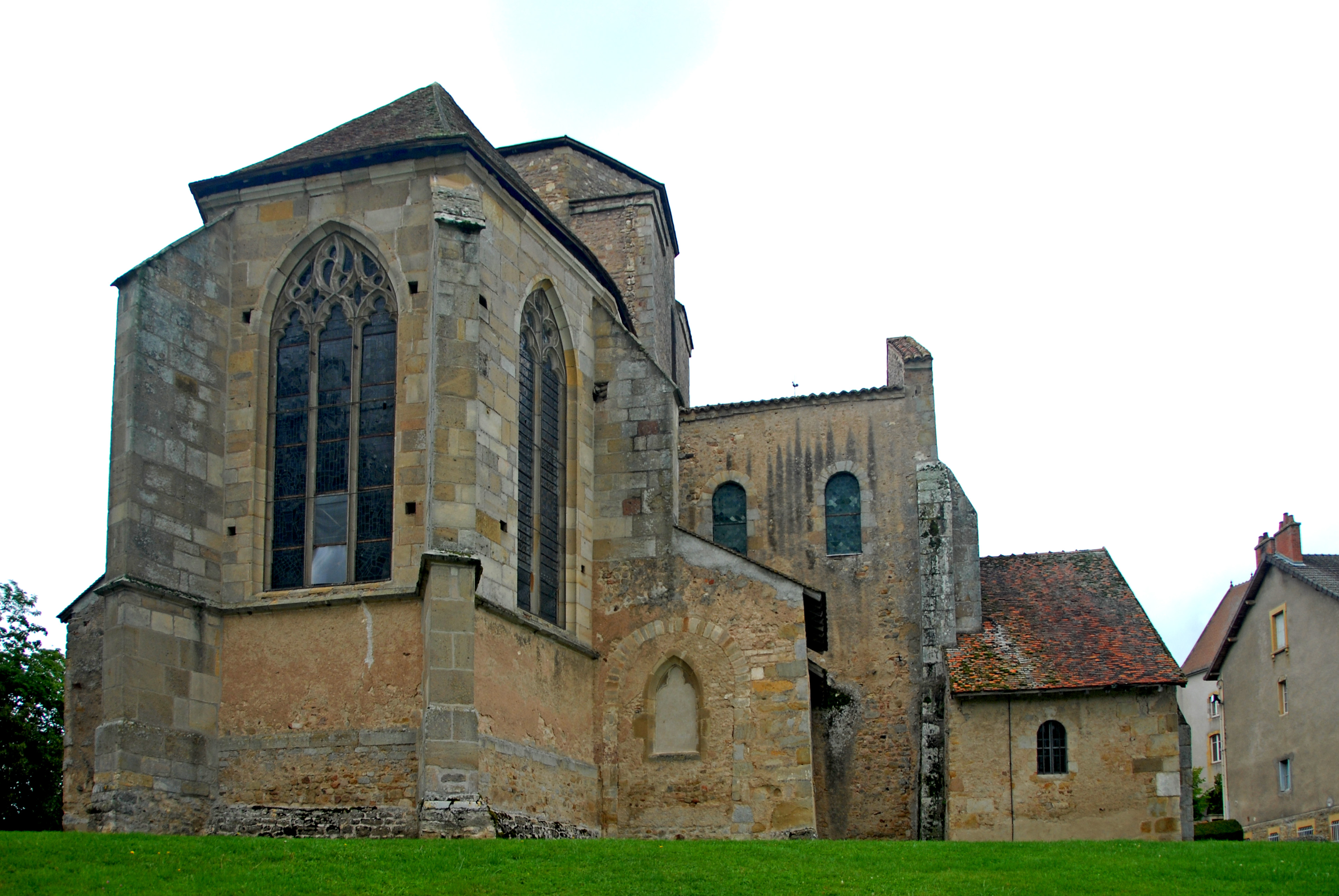 Prioratskirche, Südostseite von NO